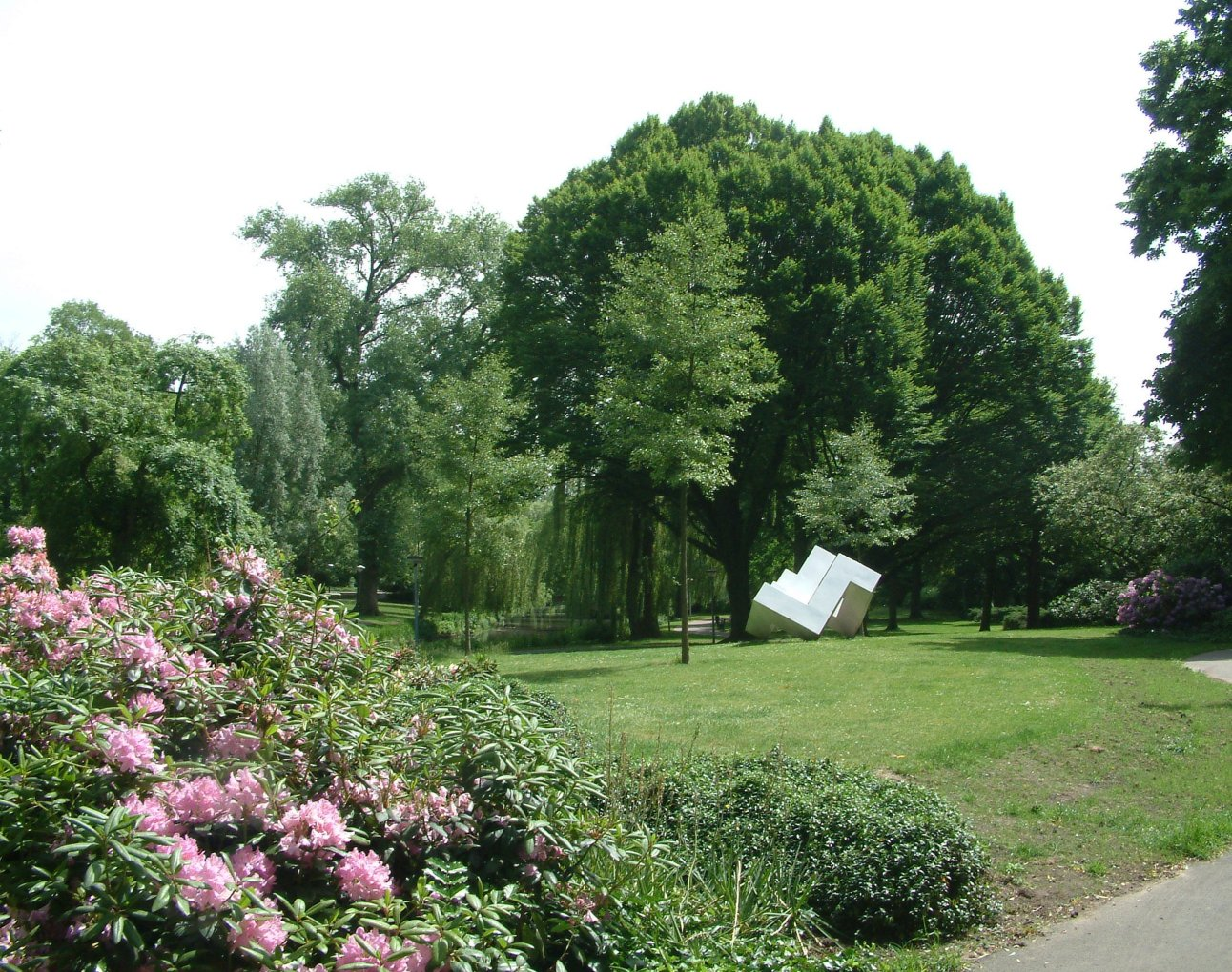 Anne Frankplantsoen in Eindhoven. Kunstwerk: Wit object van Ries Linnartz, gemaakt van geschilderd staal en dateert van 1969.